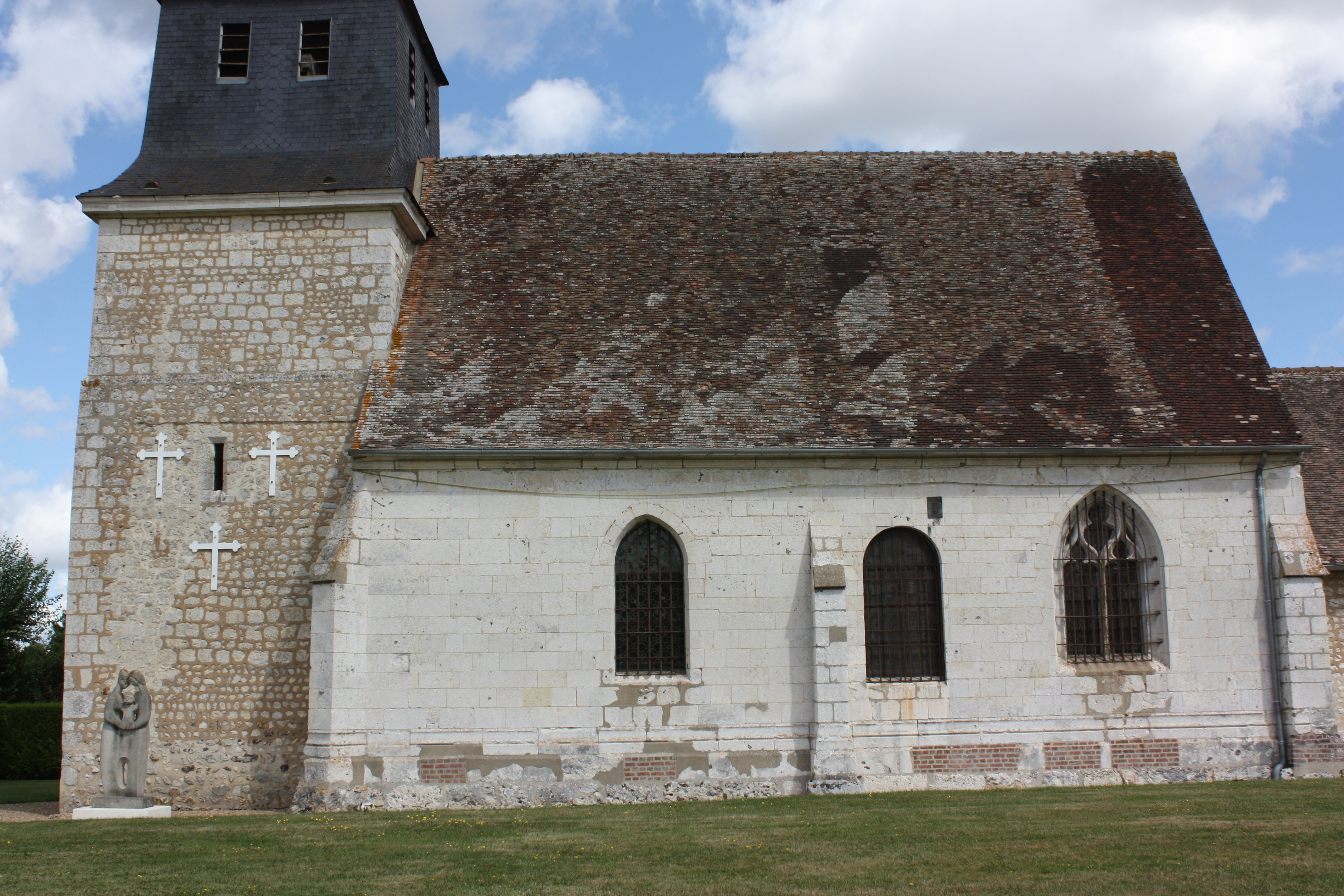 Brosville - Eglise Saint-Martin Vue générale du Sud